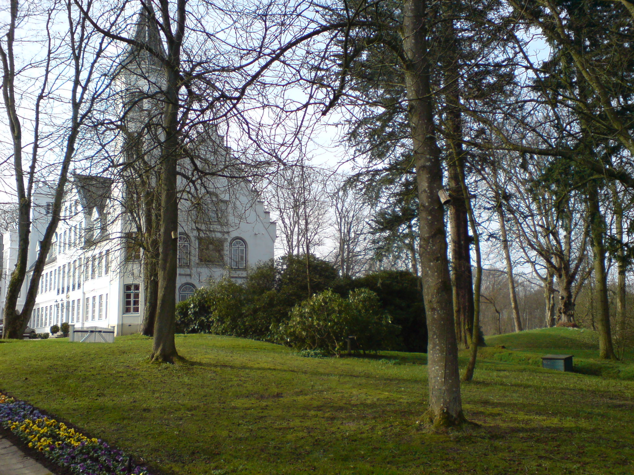 Breitenburg, Nordflügel Garten